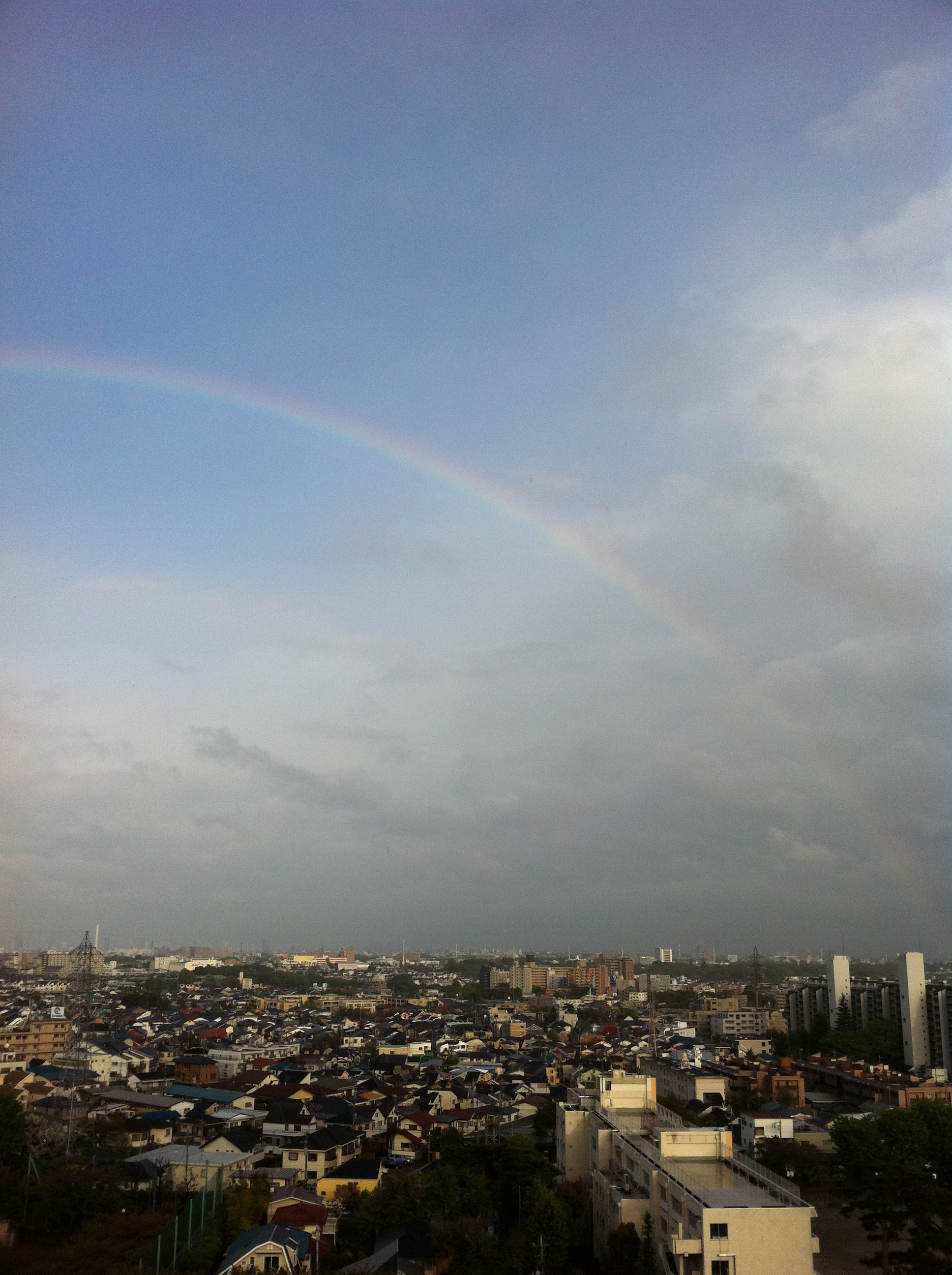 深大寺レジデンスから見る、世田谷方面にかかる虹